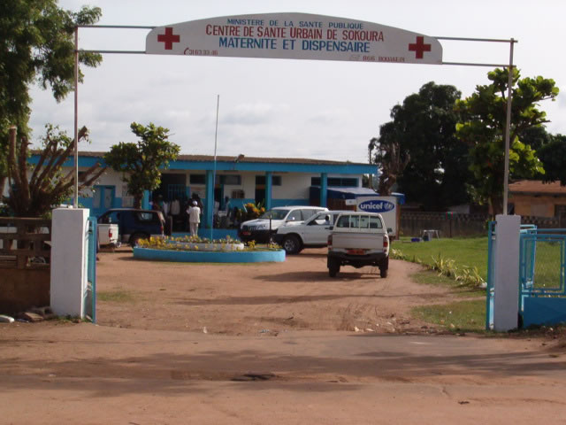 Centre de santé urbain de Bouaké, quartier Sokoura (Côte d'Ivoire)